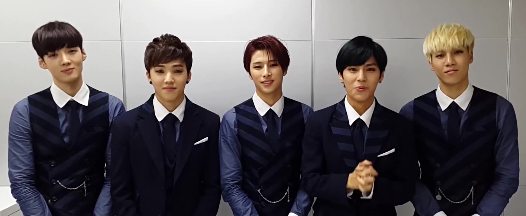 (싹튜브) SAC 방송댄스과 졸업발표회 축하메세지